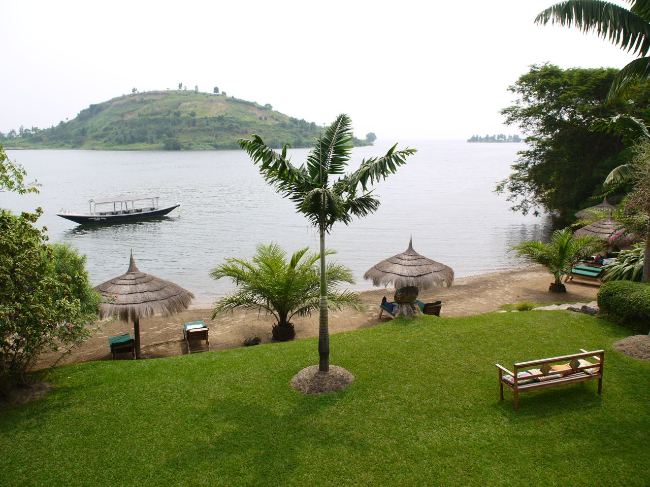 En jawel, dit is het Kivumeer! Vlak aan de grens tussen Rwanda en de DR Congo.